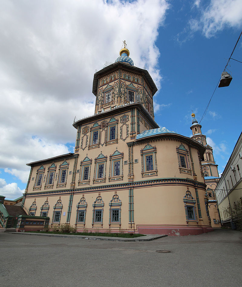 Сабор